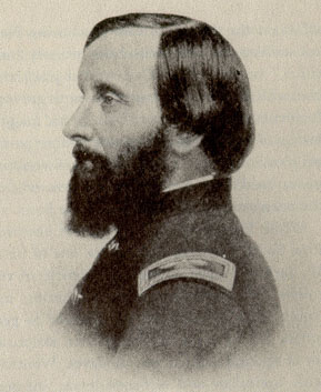 Thomas Wentworth Higginson